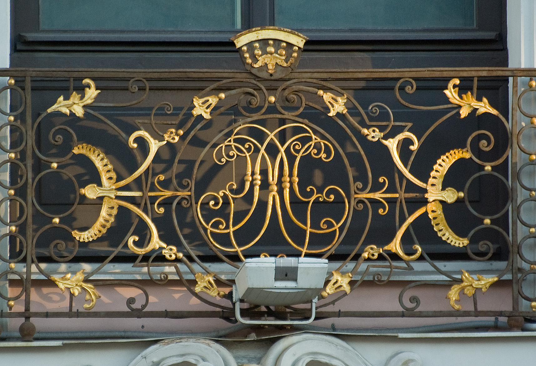 Строгановский дворец, Санкт-Петербург. Фрагмент большого оконного забора.